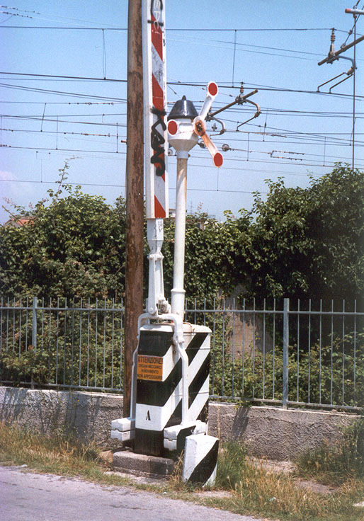 "passaggio a raso" (ground-level passage) in Pisa, Italy